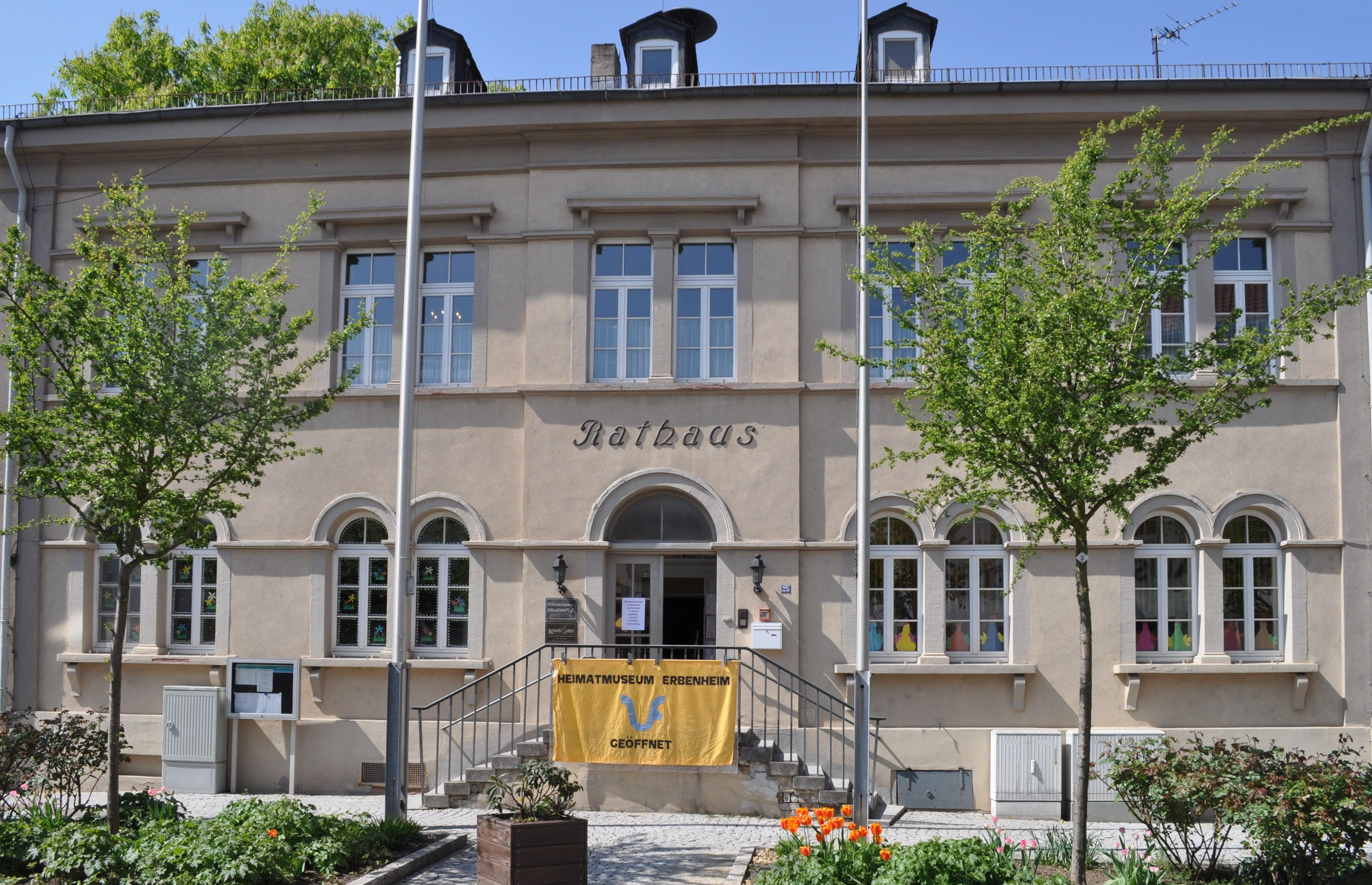 Wiesbaden-Erbenheim, Altes Rathaus, heute Heimatmuseum